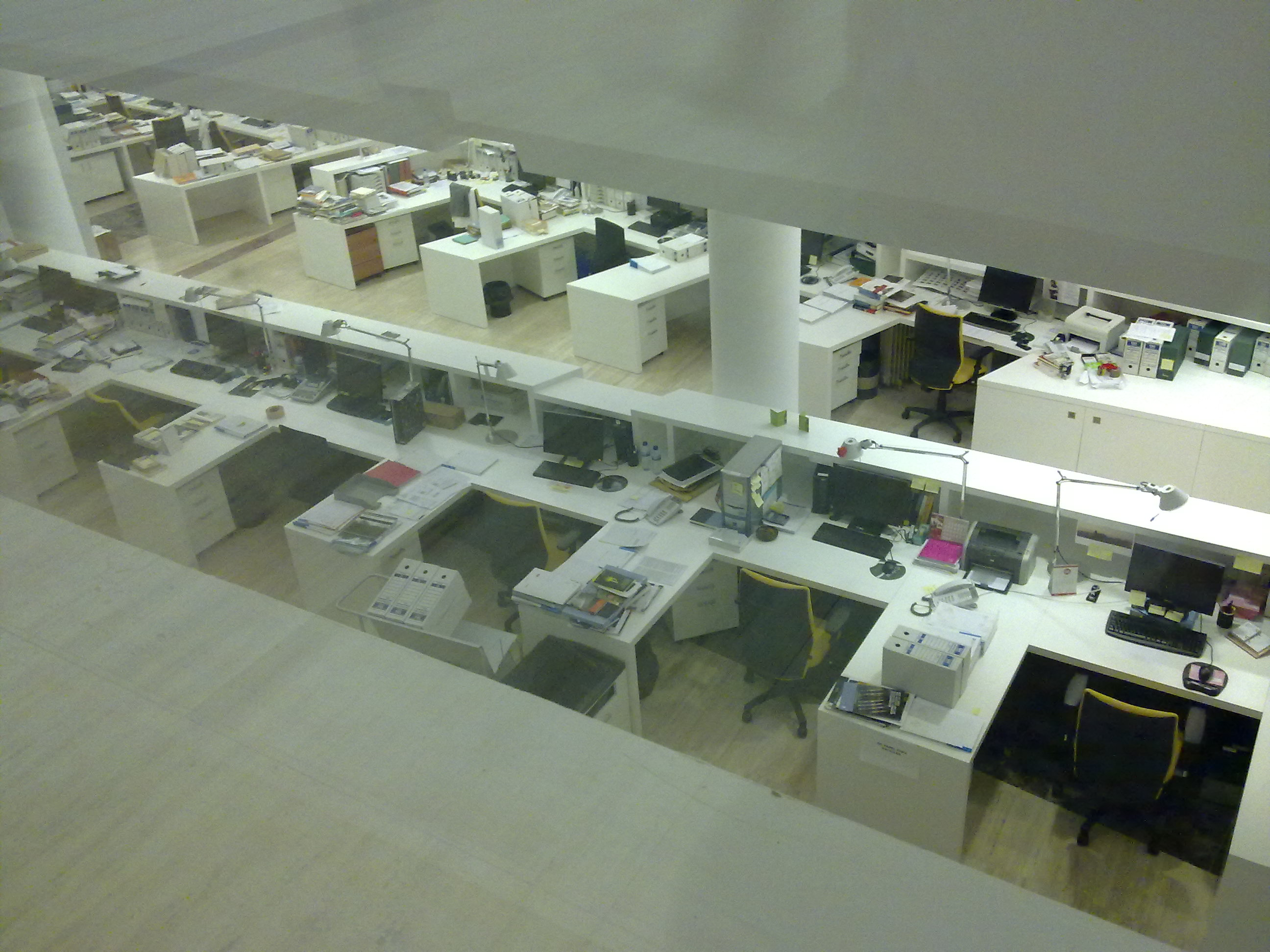 Cidade da Cultura